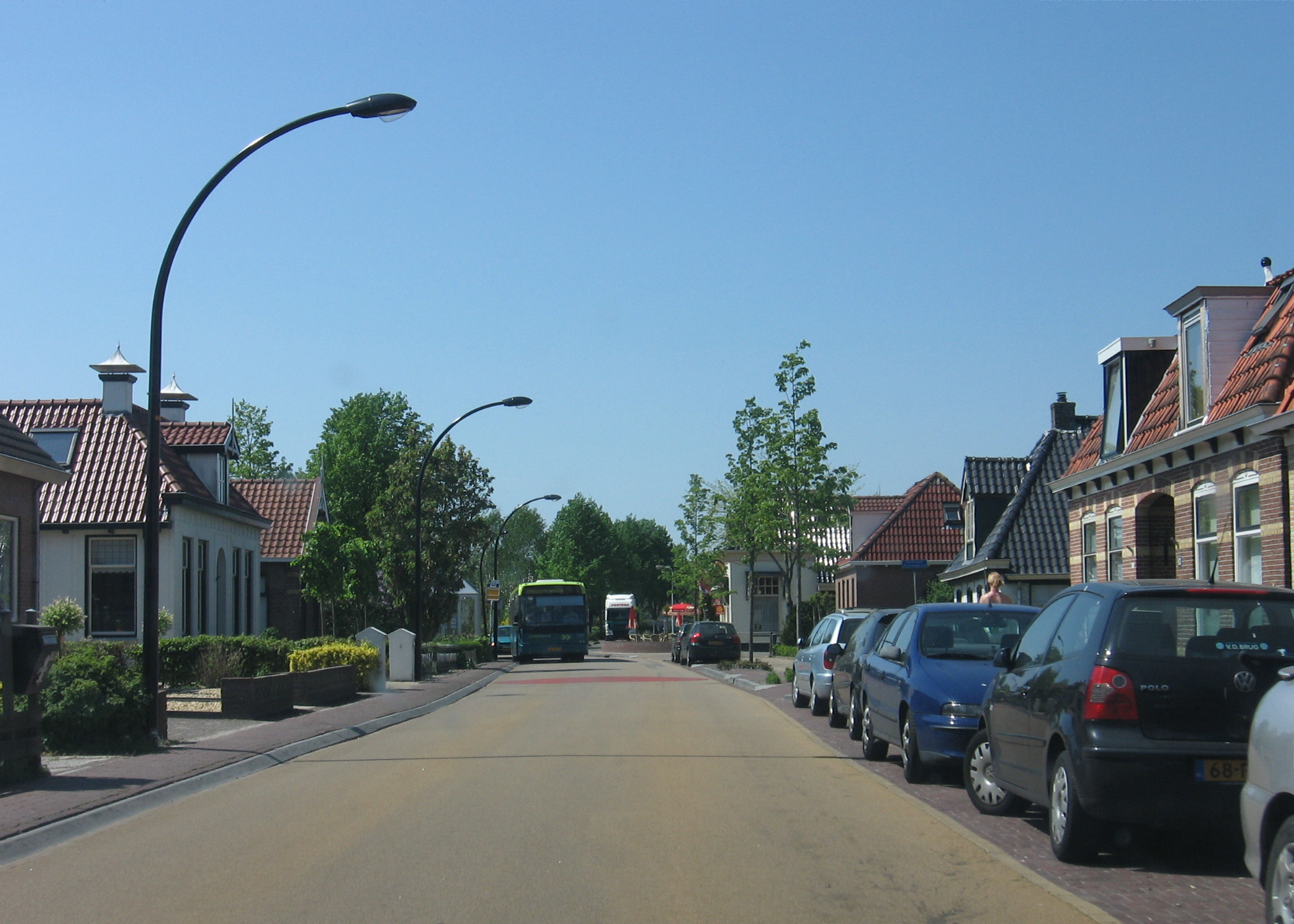 Oudehaske